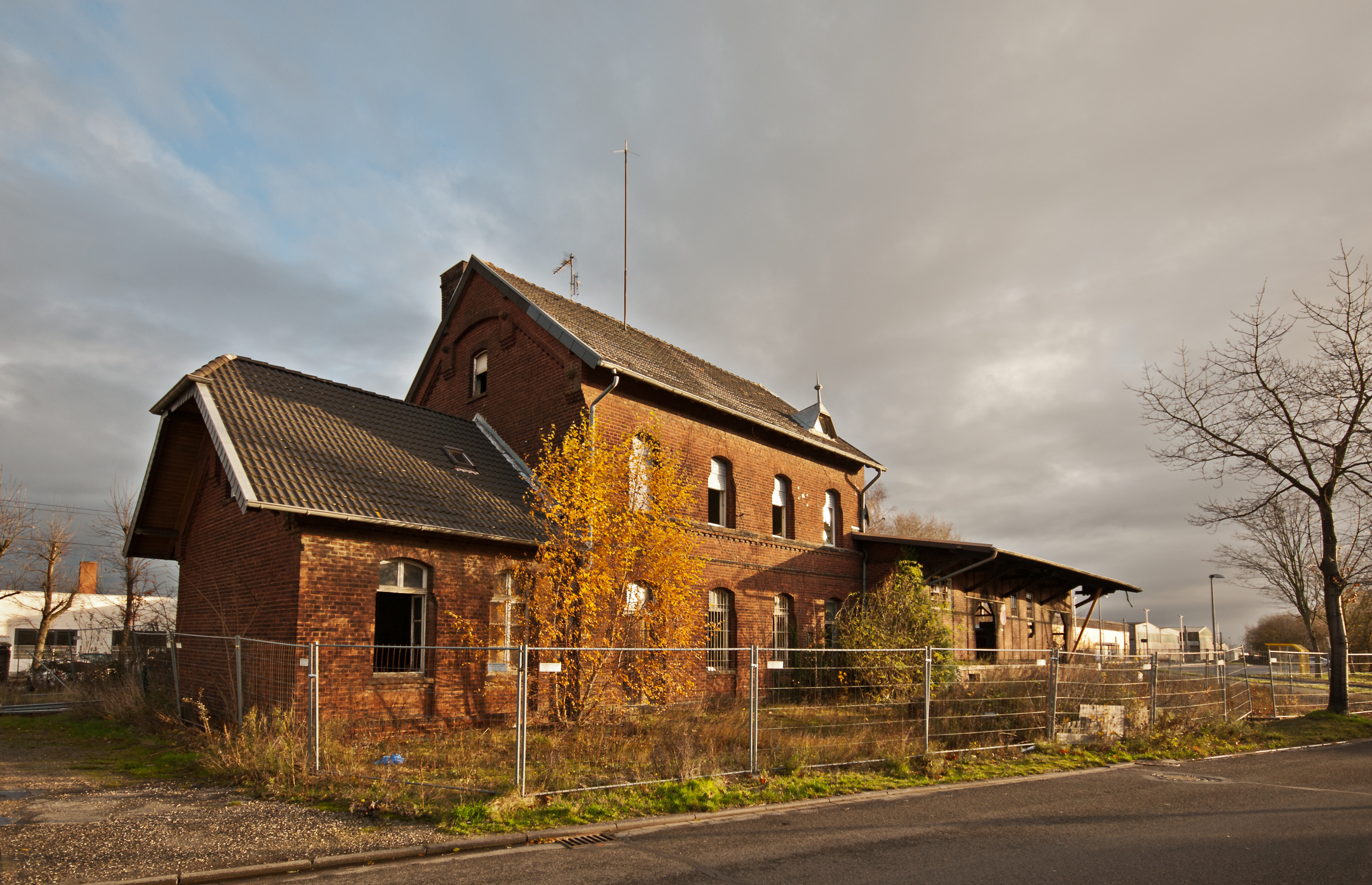 Der in ruiniertem Zustand befindliche Dremmener Bahnhof, einziges verbliebenes Gebäude aus der Zeit der Streckenerrichtung. Dahinter rechts die Anlagen des neuen Haltepunktes Dremmen.